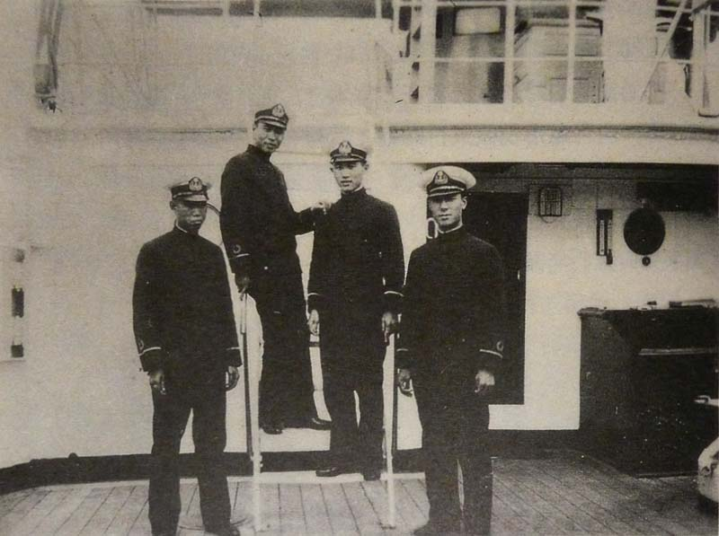 青島海校畢業生在"海圻"艦實習, 左起: 劉廣超(後任海軍總司令劉廣凱之兄), 馬紀壯(後任海軍總司令及國防部副部長, 總統府秘書長), 陸維源(戰後任"永興"艦長被叛艦者殺害), 李連墀(後任巡防艇隊長及海軍供應部司令, 高雄港務局長).